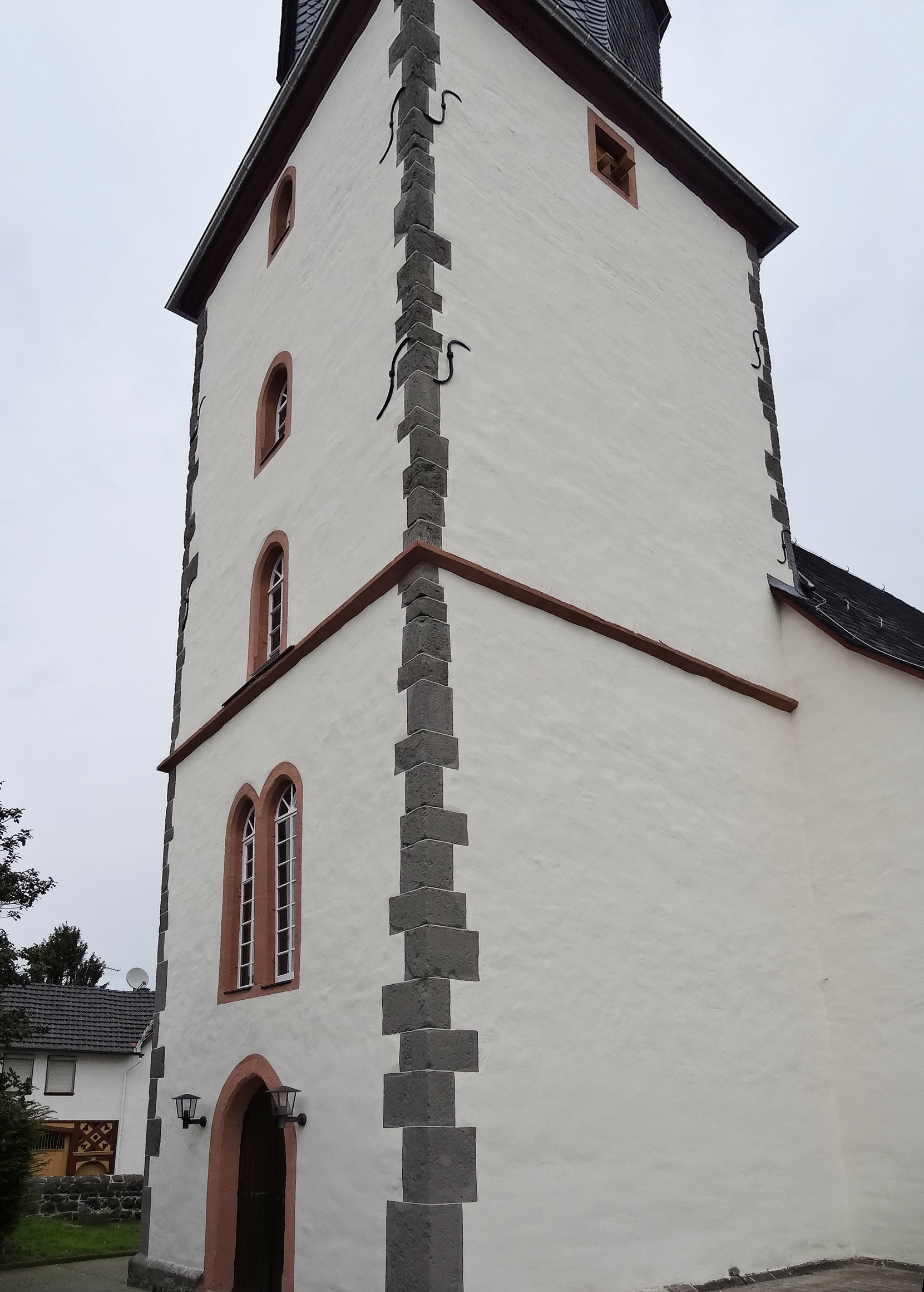 Holzheim Ev. Kirche